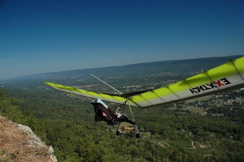 Српски (ћирилица): Безмоторно-змајарство